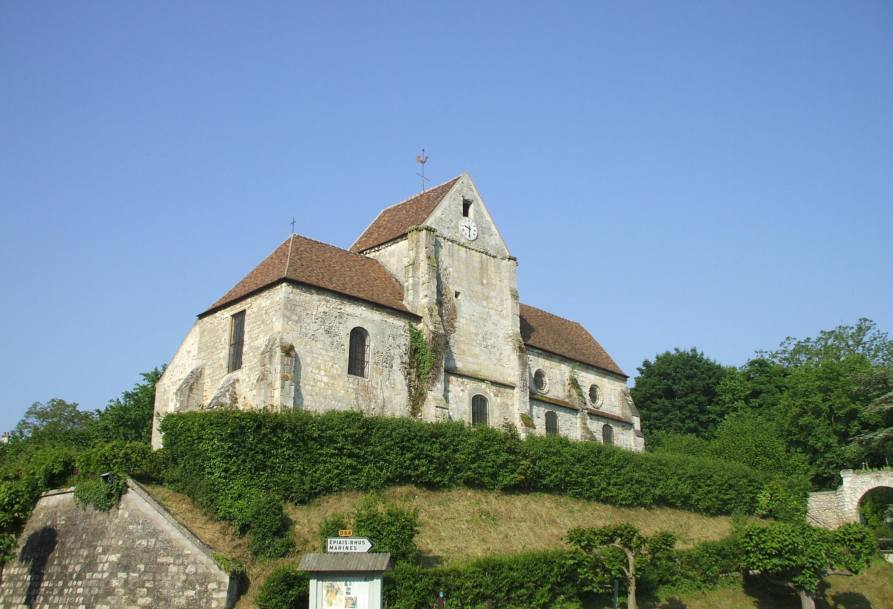 Église de Vallangoujard, Val d'oise, France